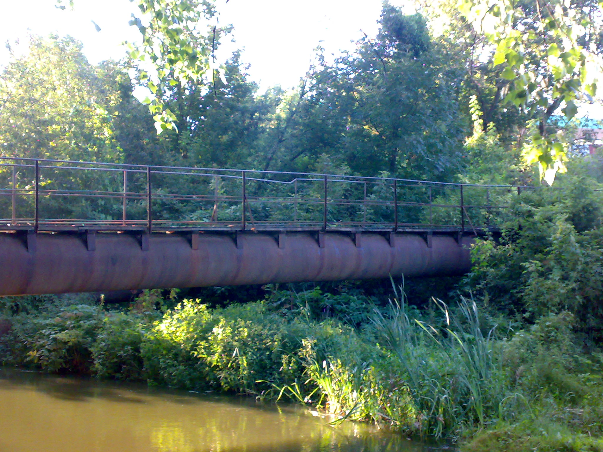 Міст через річку Протоку , що з'єднує 4 мікрорайон з Рибгоспом